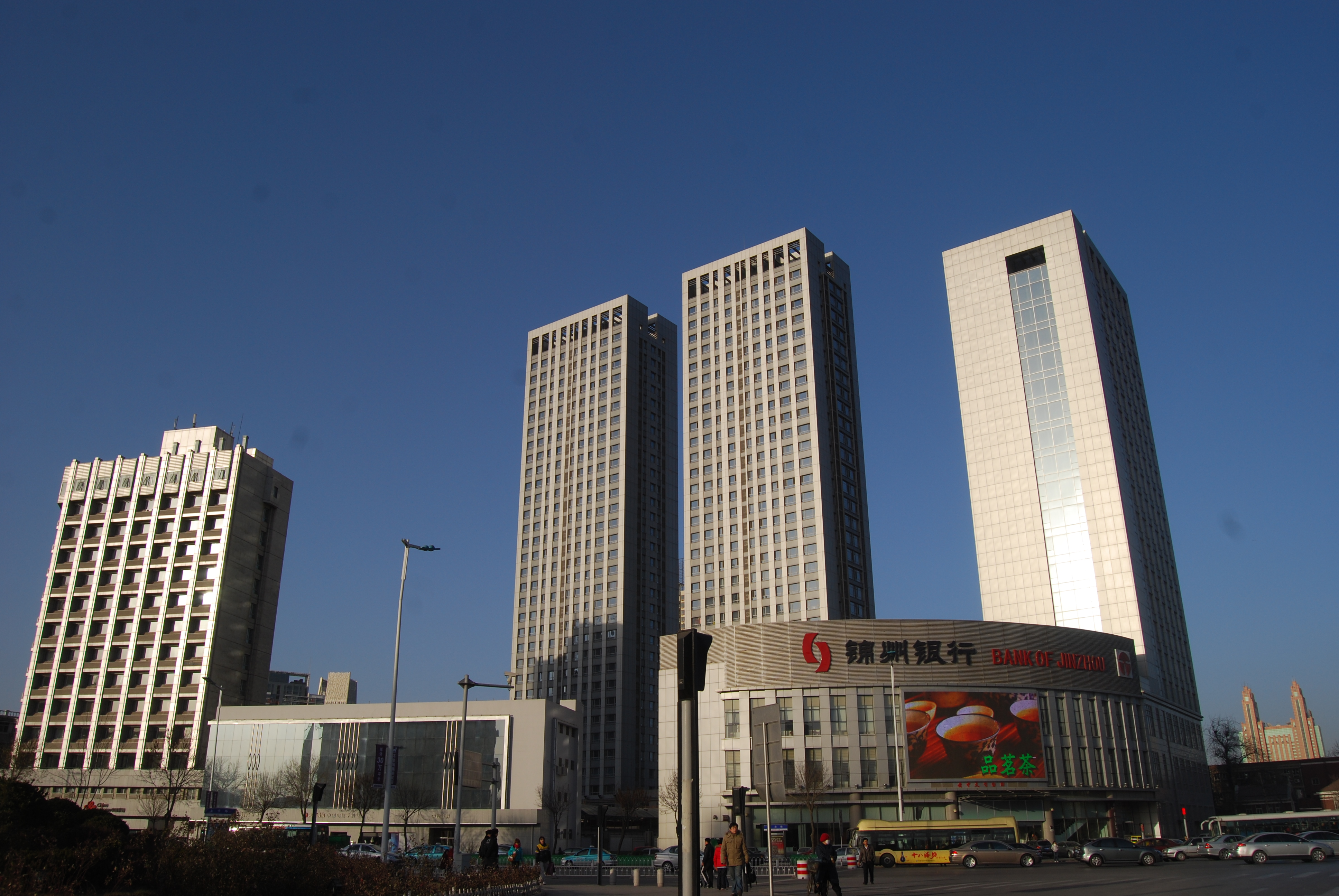 假日国际大厦